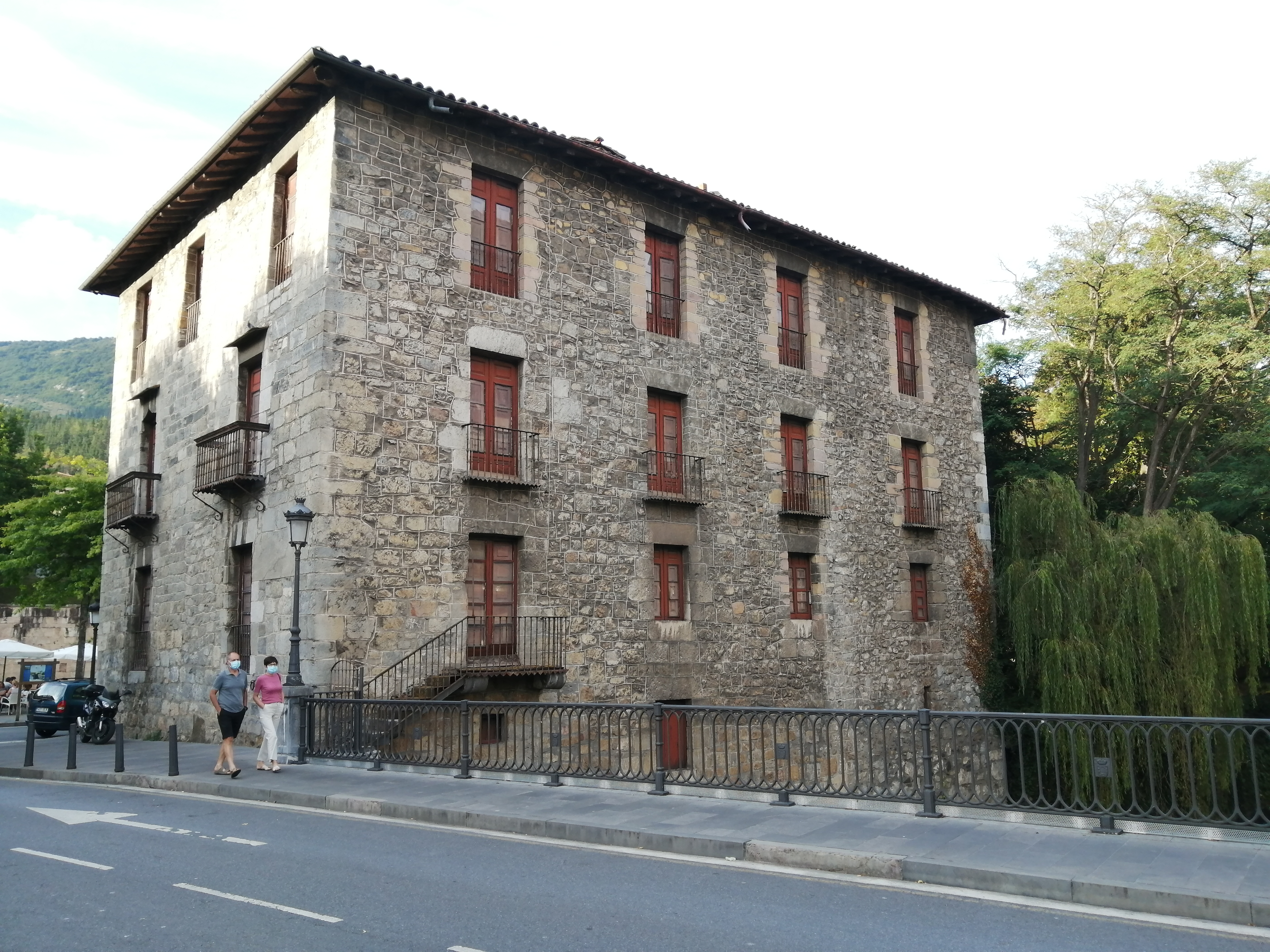 Zubieta dorretxea Azkoitian